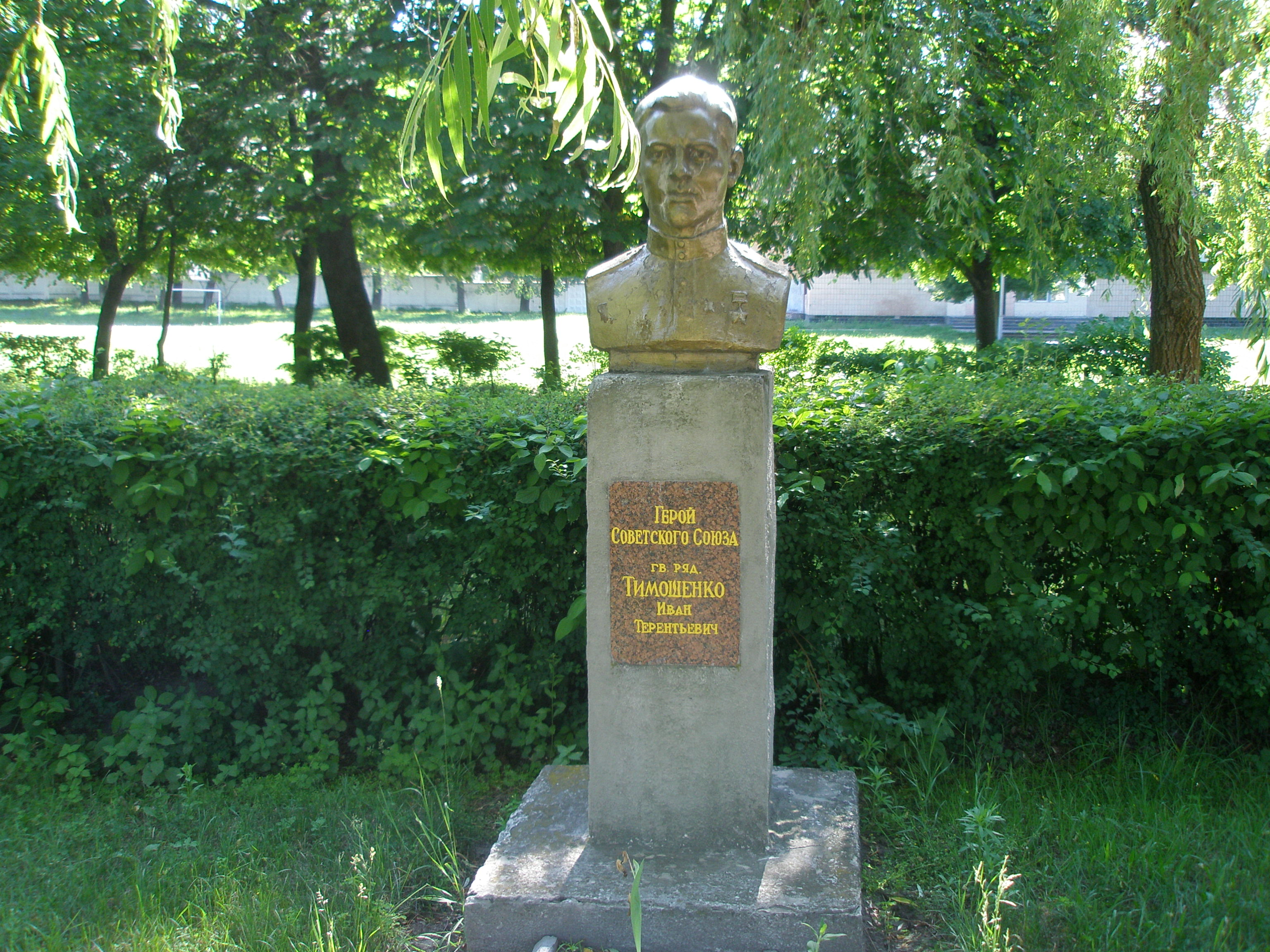 Бюст гвардии рядовому Тимошенко Ивану Терентьевичу